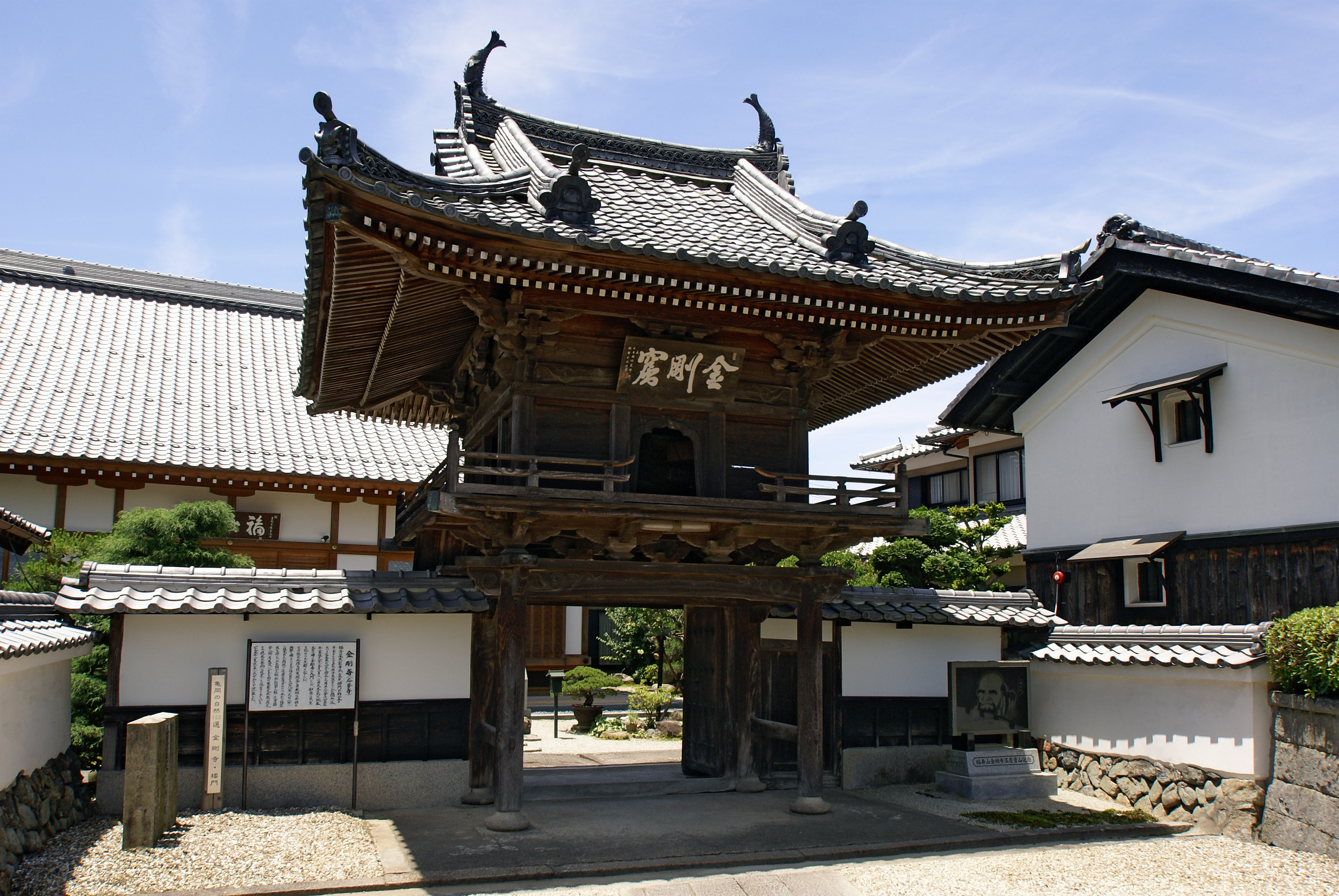 Kongoji in Kameoka, Kyoto prefecture, Japan